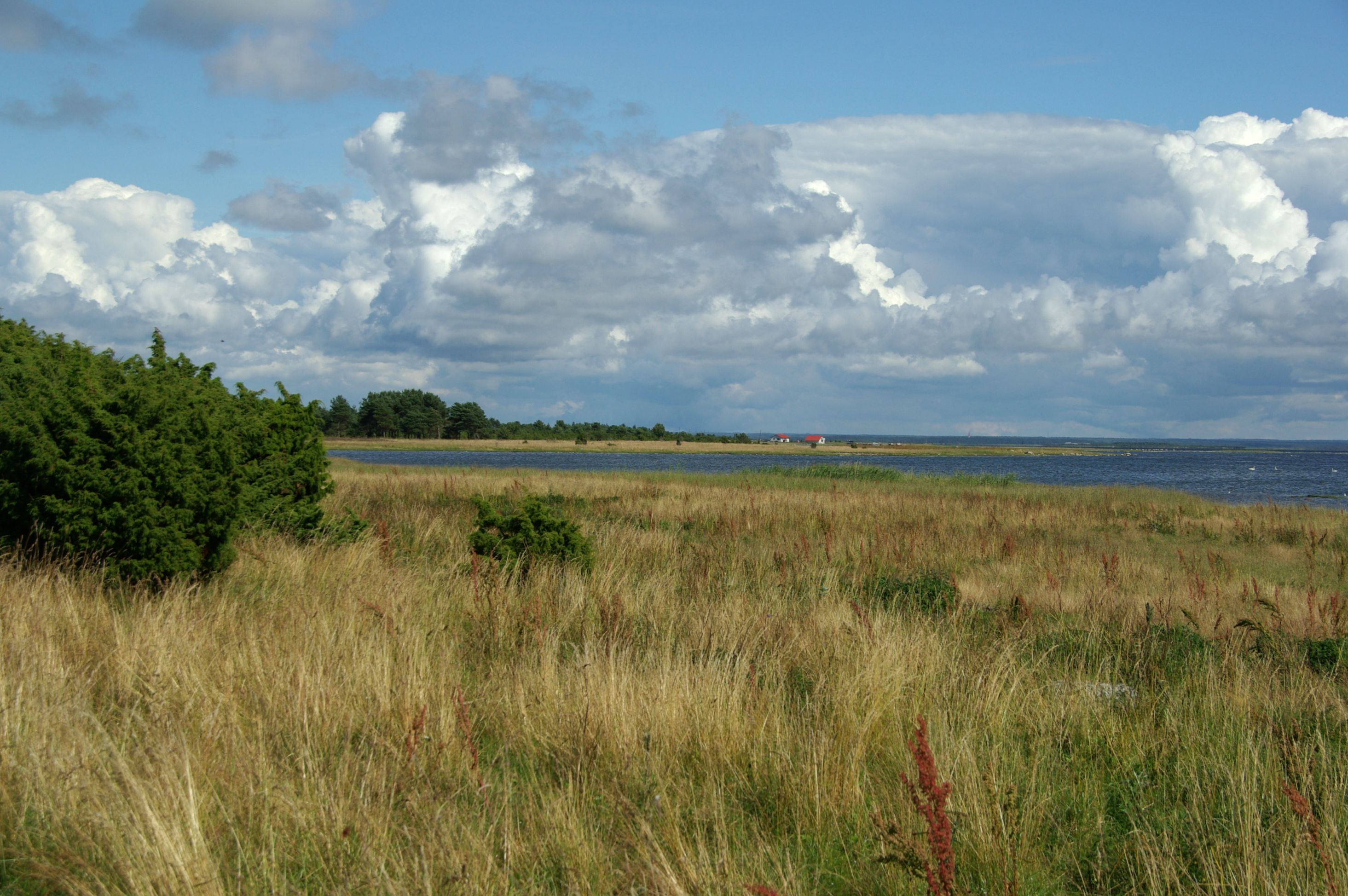 vaade Vilsandi Vikati sadamale